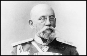 Le gouverneur général de Finlande m. N. Bobrikov